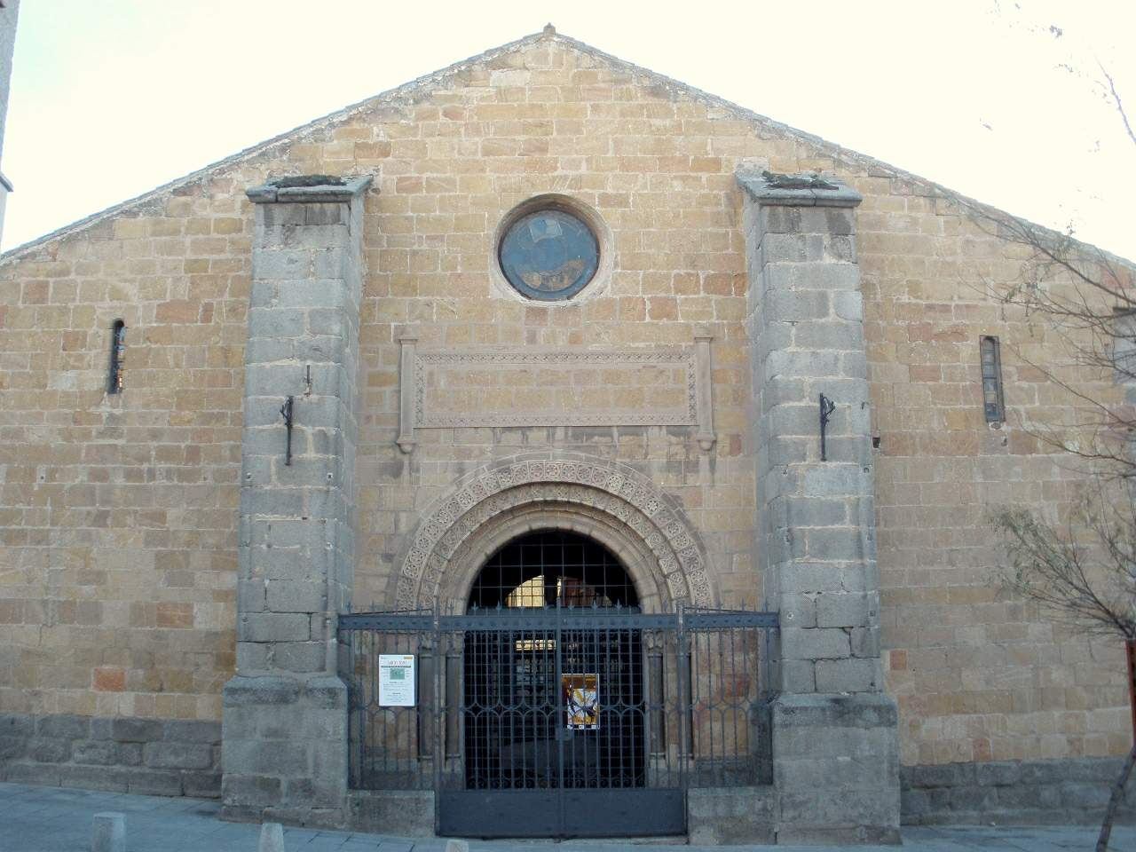 Avila - Museo de Avila, Iglesia de Santo Tome el Viejo